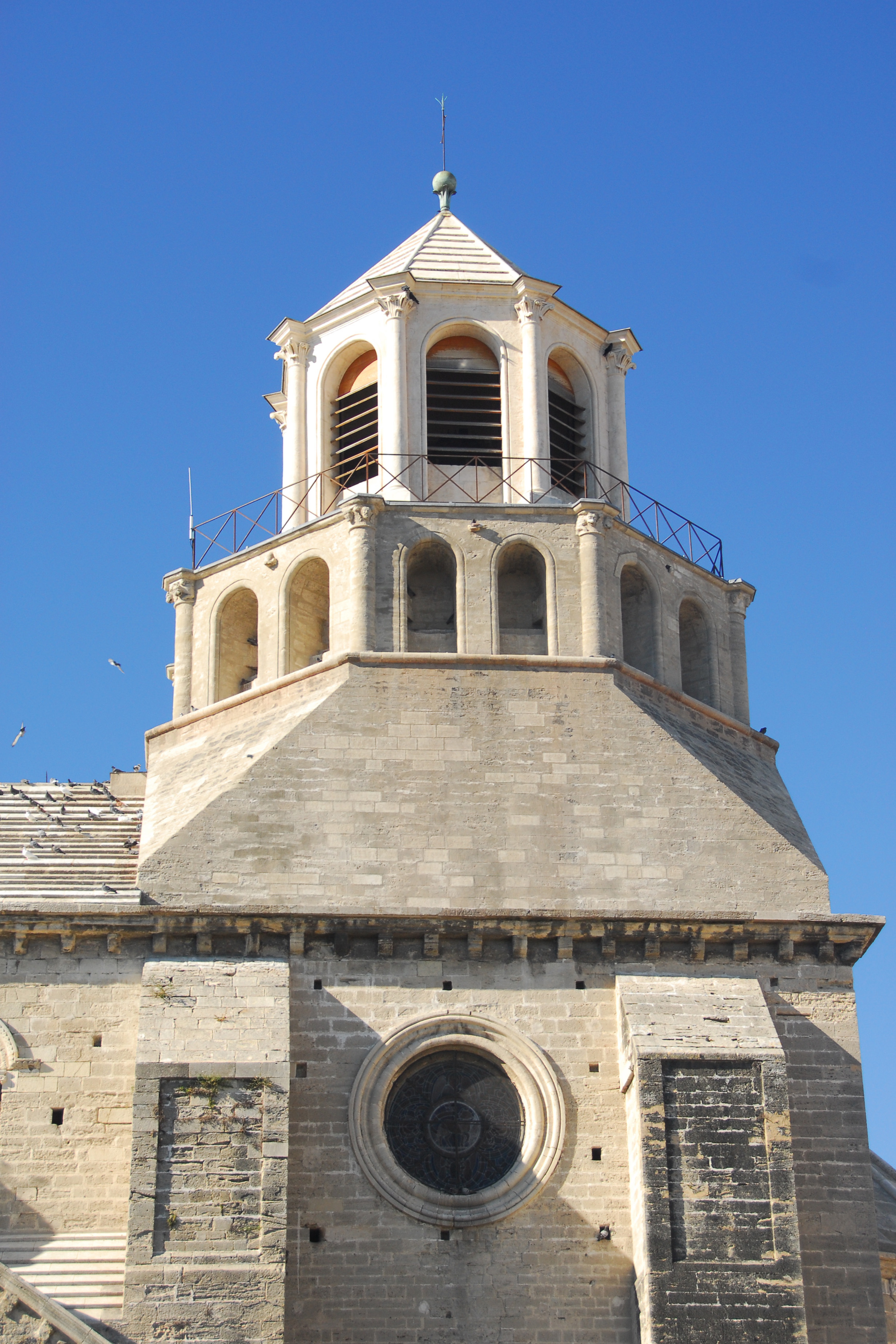 N-D-du-Lac du Le Thor, Vierung mit Glockenturm von Süden